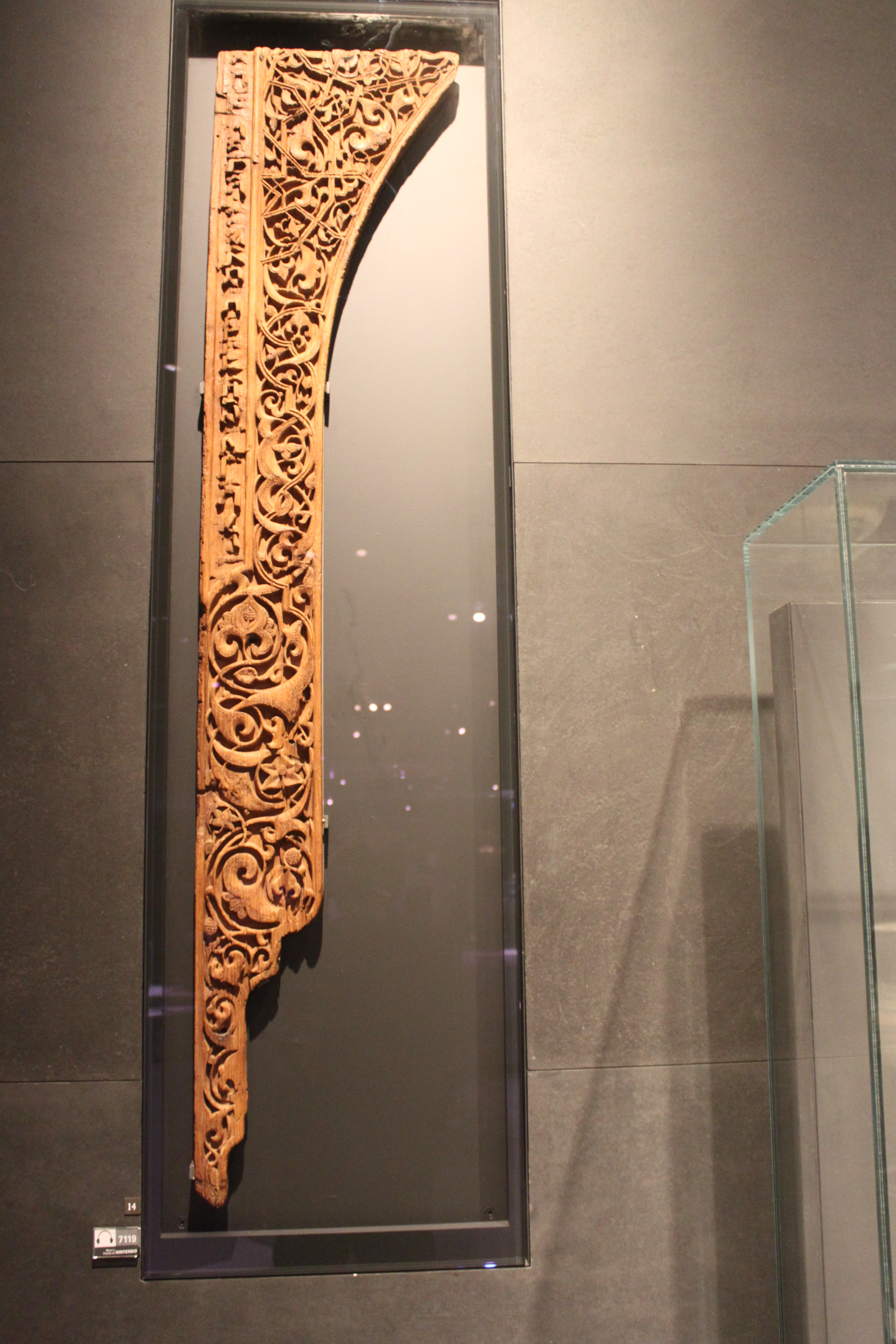 Élément d’arcature - 12e siècle - Égypte, Le Caire - Bois de cyprès sculpté - Don L. Hayaux du Tilly, 1910 - Département des Arts de l'Islam - Vitrine 31A - Musée du Louvre - Inventaire : OA 6348. Le cartel indique : Le décor végétal complexe est caractéristique de la fin de la période fatimide. L’inscription en hébreu indique une utilisation dans un édifice cultuel ; il pourrait s’agir de la synagogue Ben Ezra, à Fustat, détruite puis reconstruite au 11e siècle, pour laquelle d’autres fragments de décor sont connus. Les artisans travaillaient indifféremment pour les communautés chrétienne, juive ou musulmane, selon un même vocabulaire esthétique.Cet élément a été restauré grâce au mécénat de Frédéric Jousset.